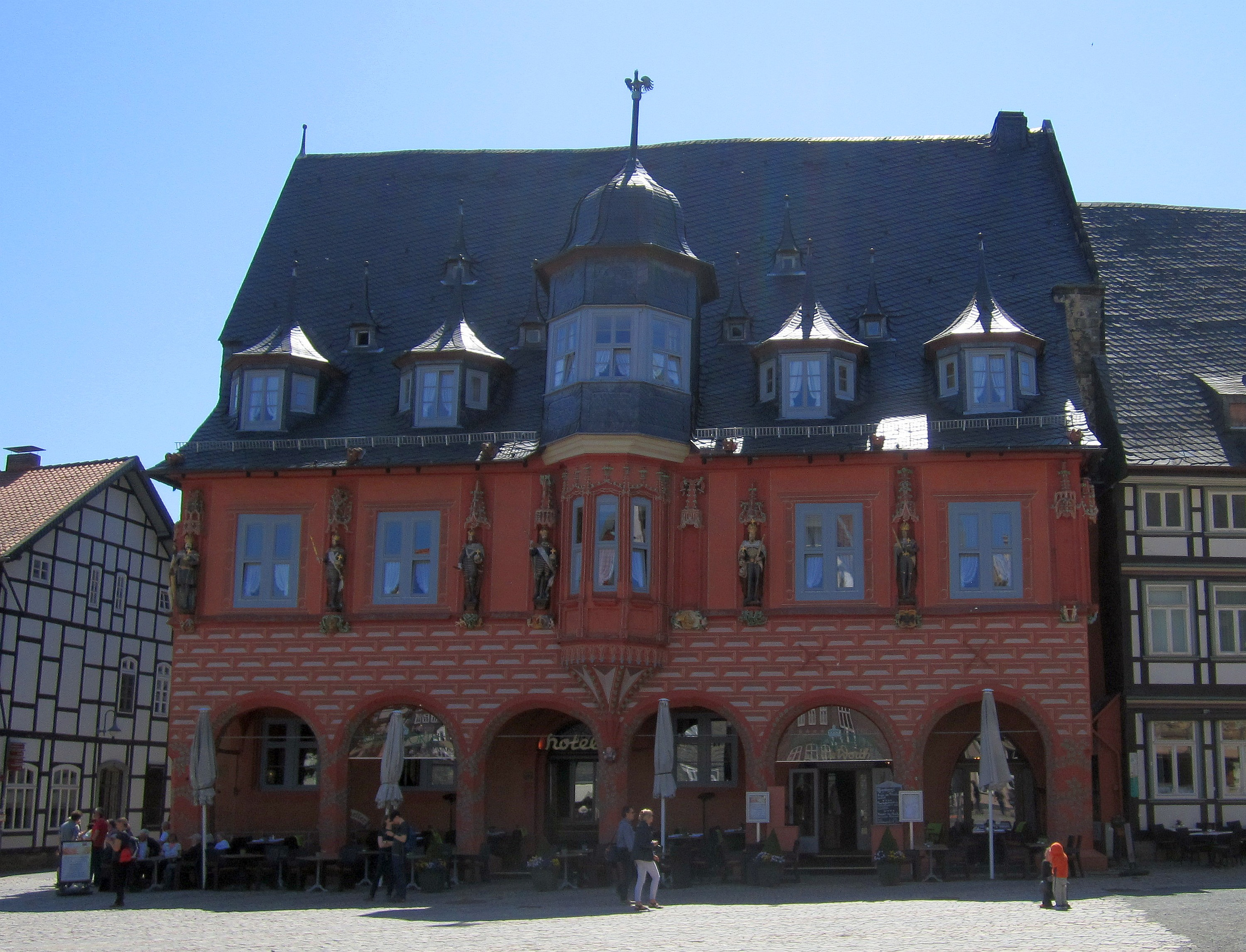 Kaiserworth. Goslar, Deutschland.